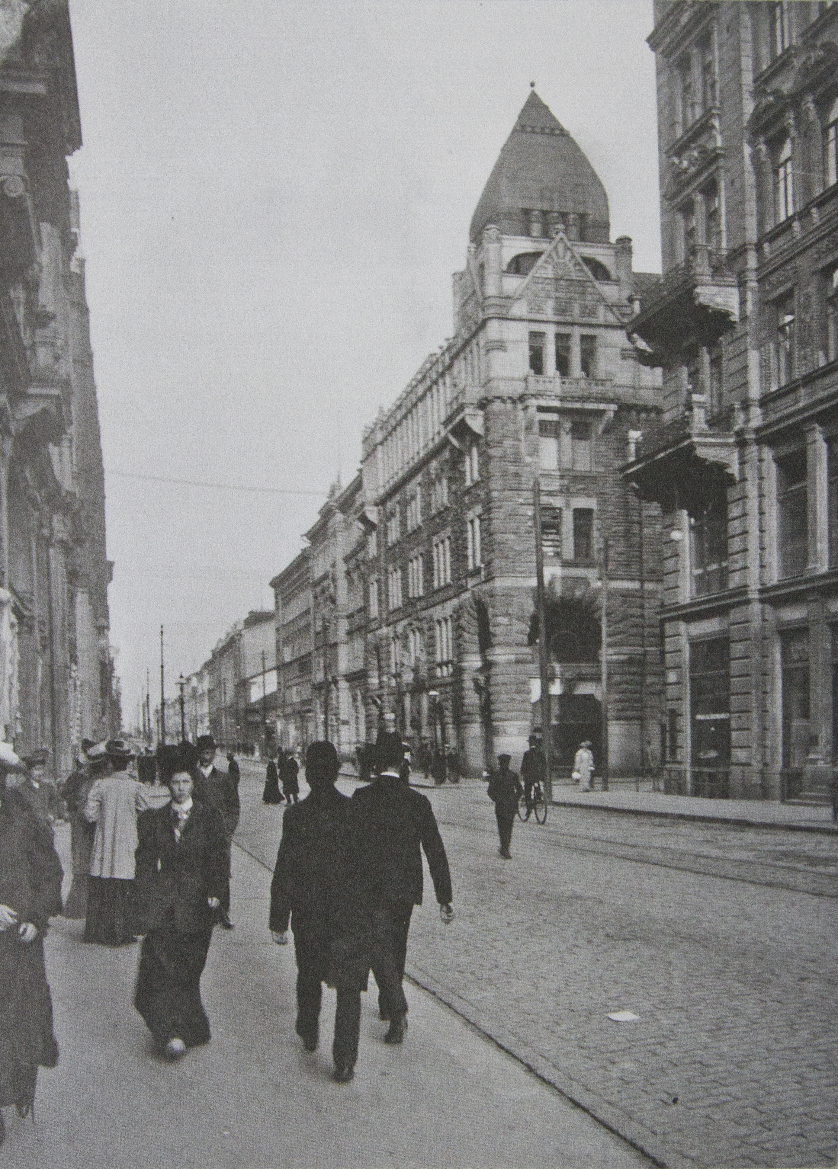 Aleksanterinkatu 1910-luvulla